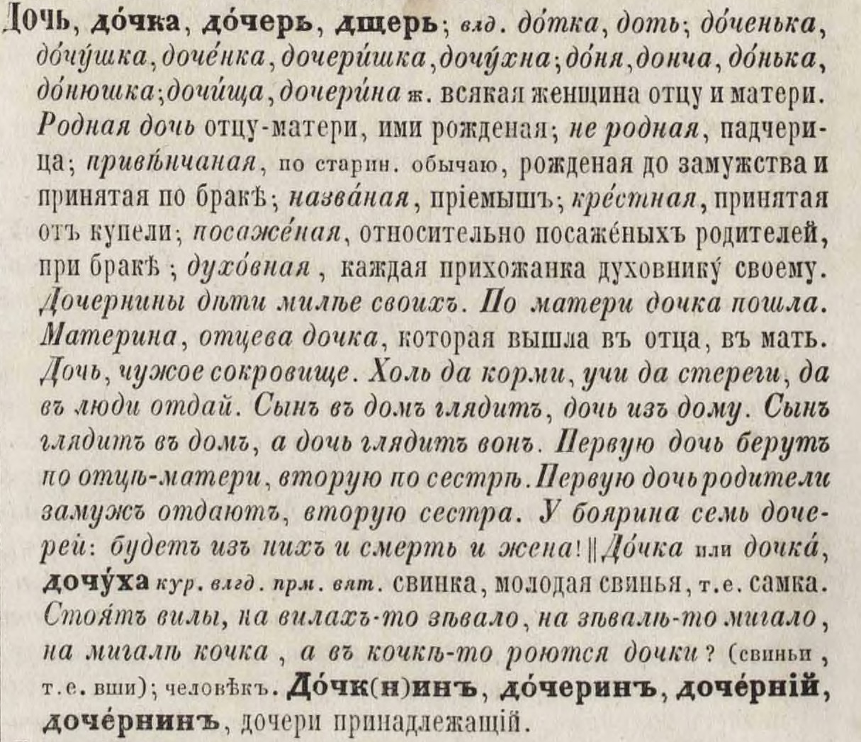 Статья "Дочь" на странице 434 в первом томе 1-го издания (1863—1866) Толкового словаря живого великорусского языка В.И. Даля.